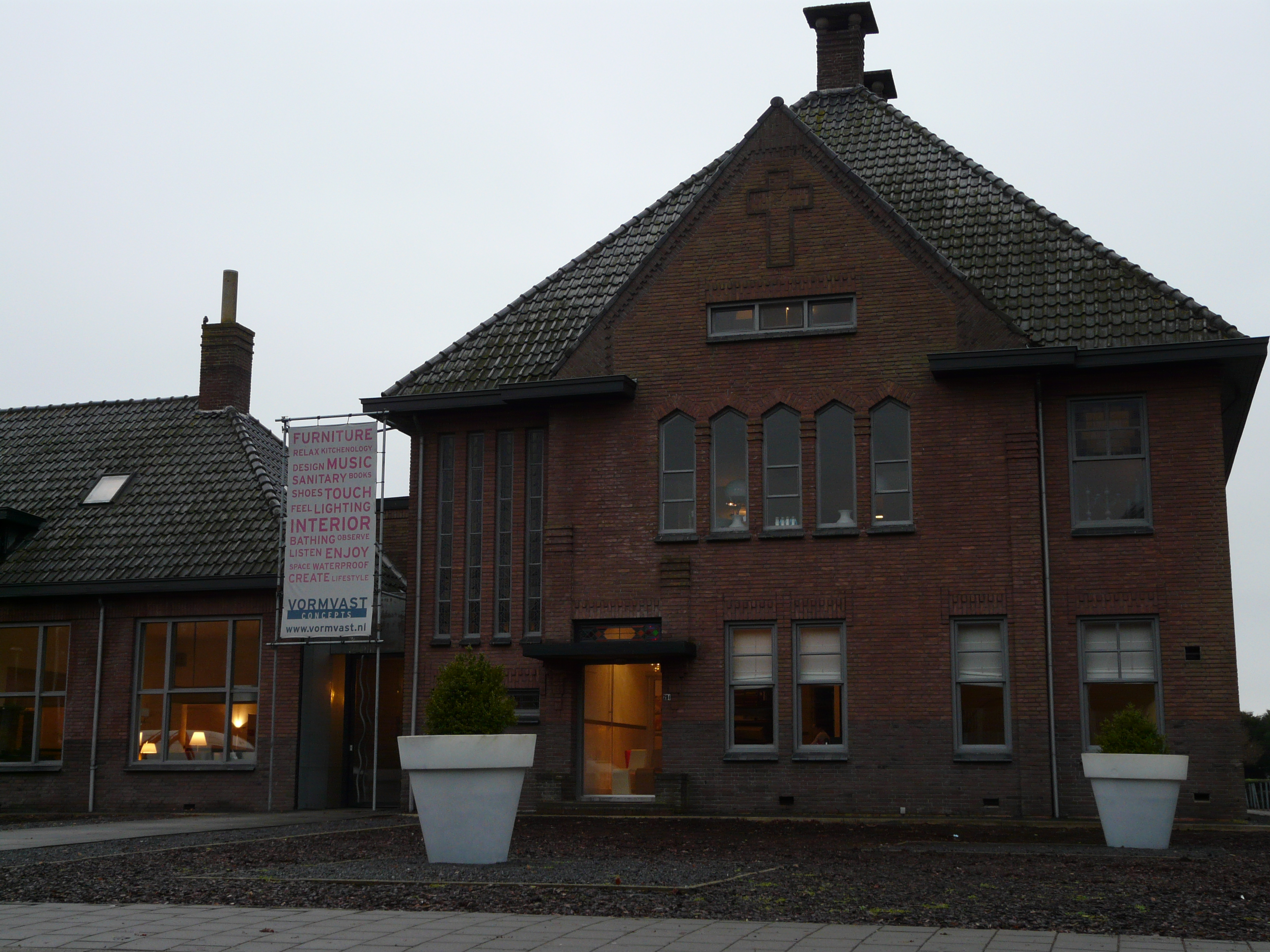 Voormalig basisschool in Lies